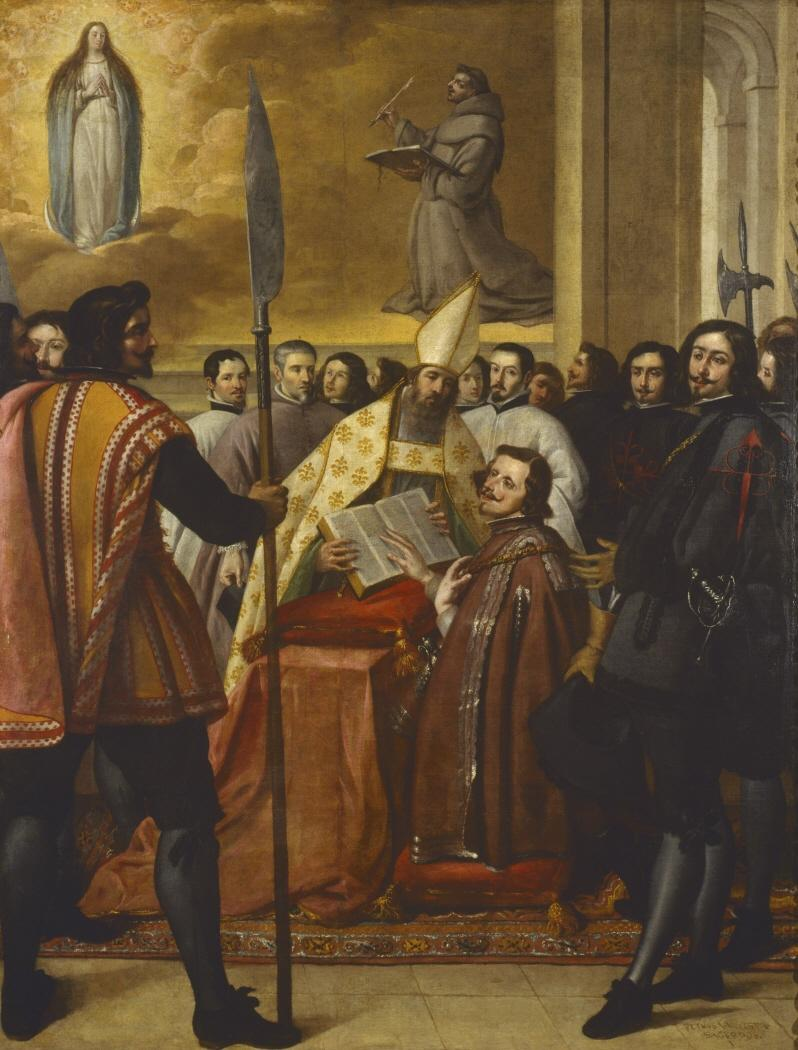 La obra representa al rey Felipe IV de España (1605-1665) jurando defender la doctrina de la Inmaculada Concepción. El monarca aparece arrodillado y extendiendo su mano sobre el Evangelio, ante un prelado vestido de pontifical. Le acompañan varios religiosos y caballeros de distintas órdenes militares. Al fondo, un gran lienzo de San Buenaventura ante la Inmaculada refuerza el significado de la escena.